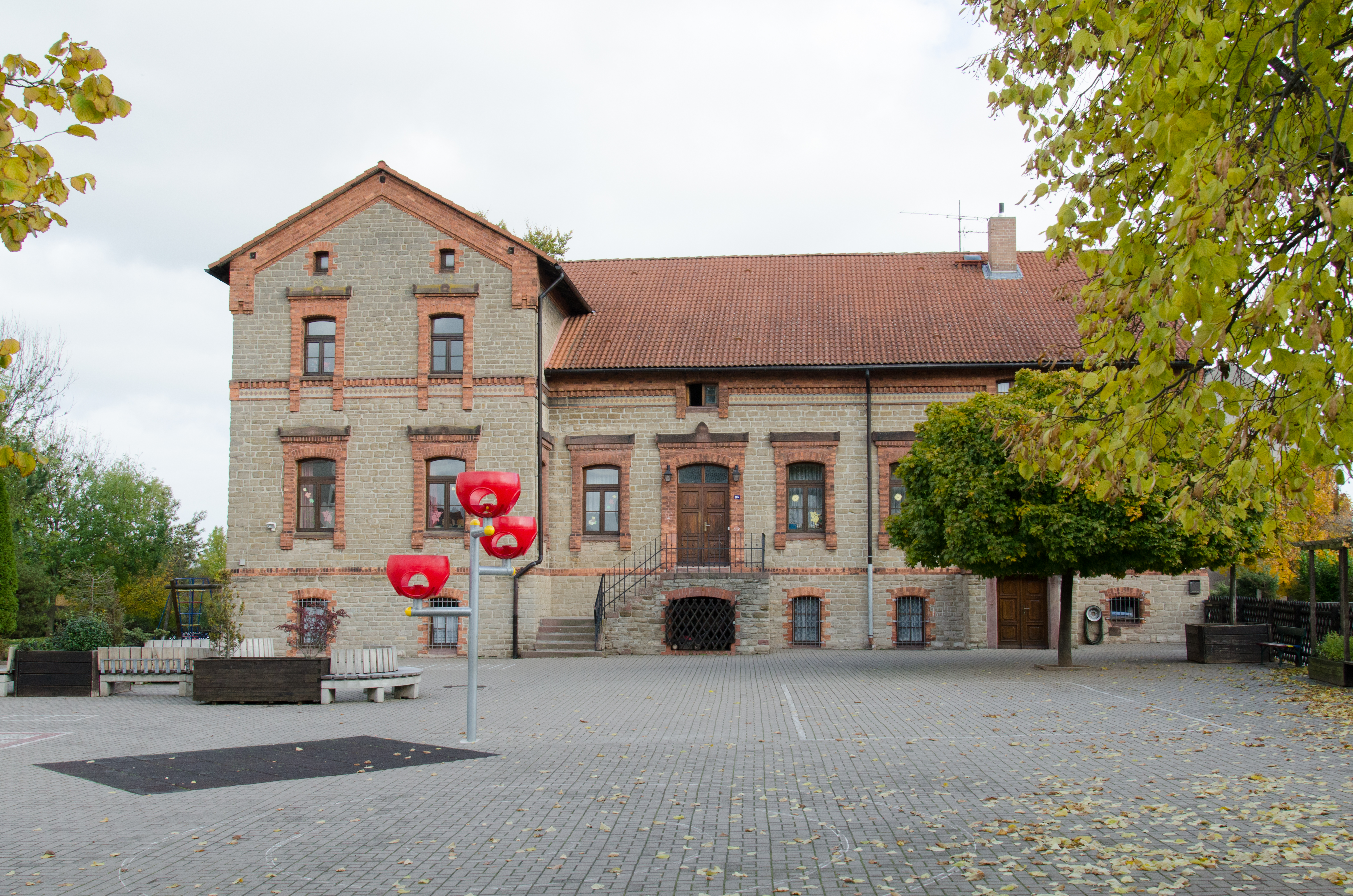 Kelbra, Bornstraße 10a